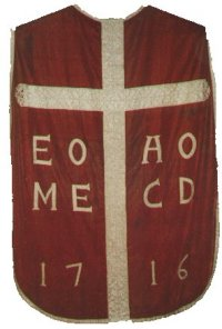 Mässhake i Lits kyrka